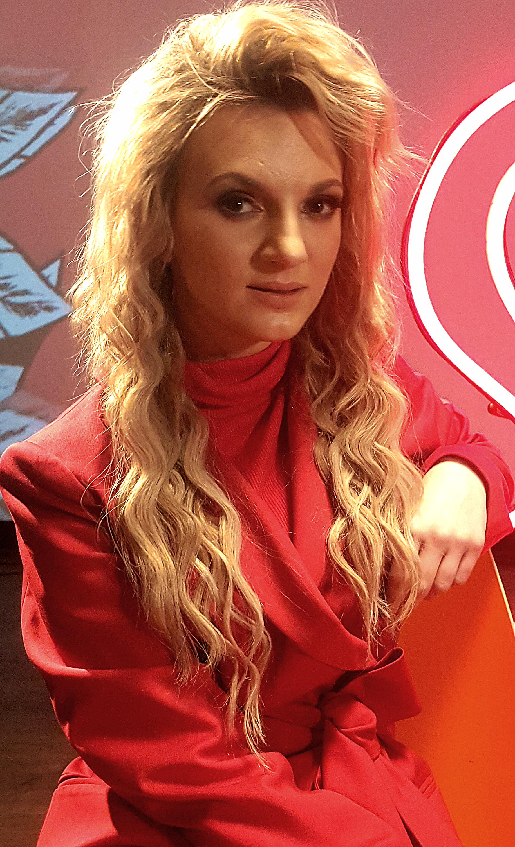 Polska piosenkarka Marta Markiewicz, znana jako Sarsa, podczas koncertu promocyjnego w studiu CGM w Warszawie.